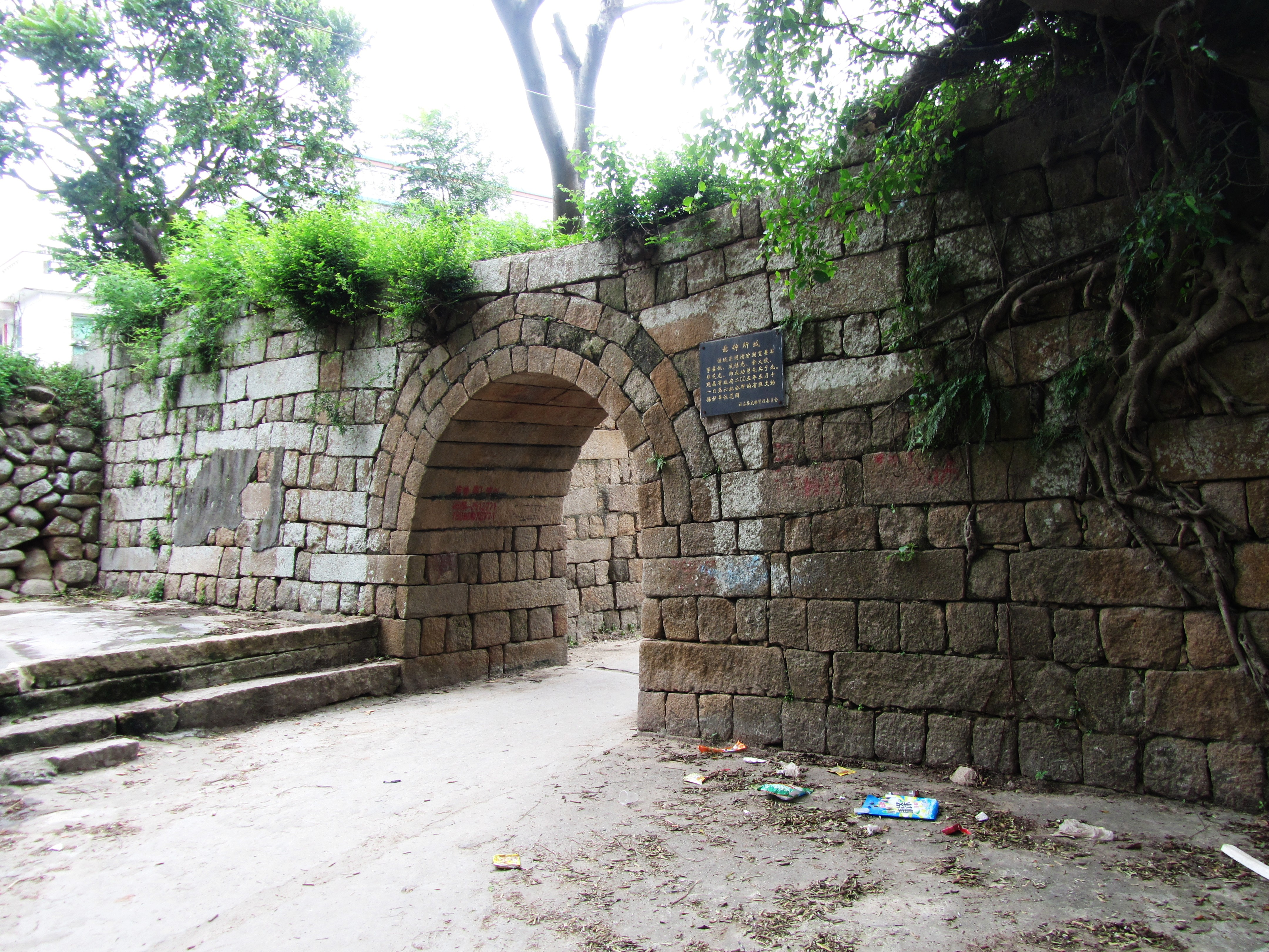 悬钟所城墙，南城门外侧。